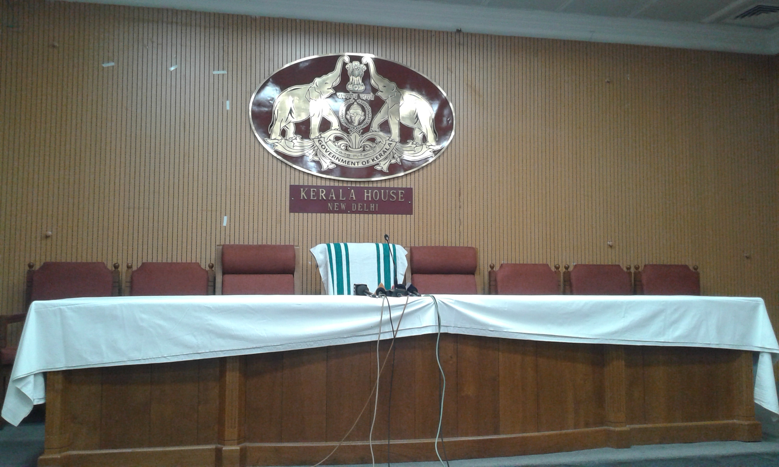 കേരള ഹൗസ് സമ്മേളന മുറി